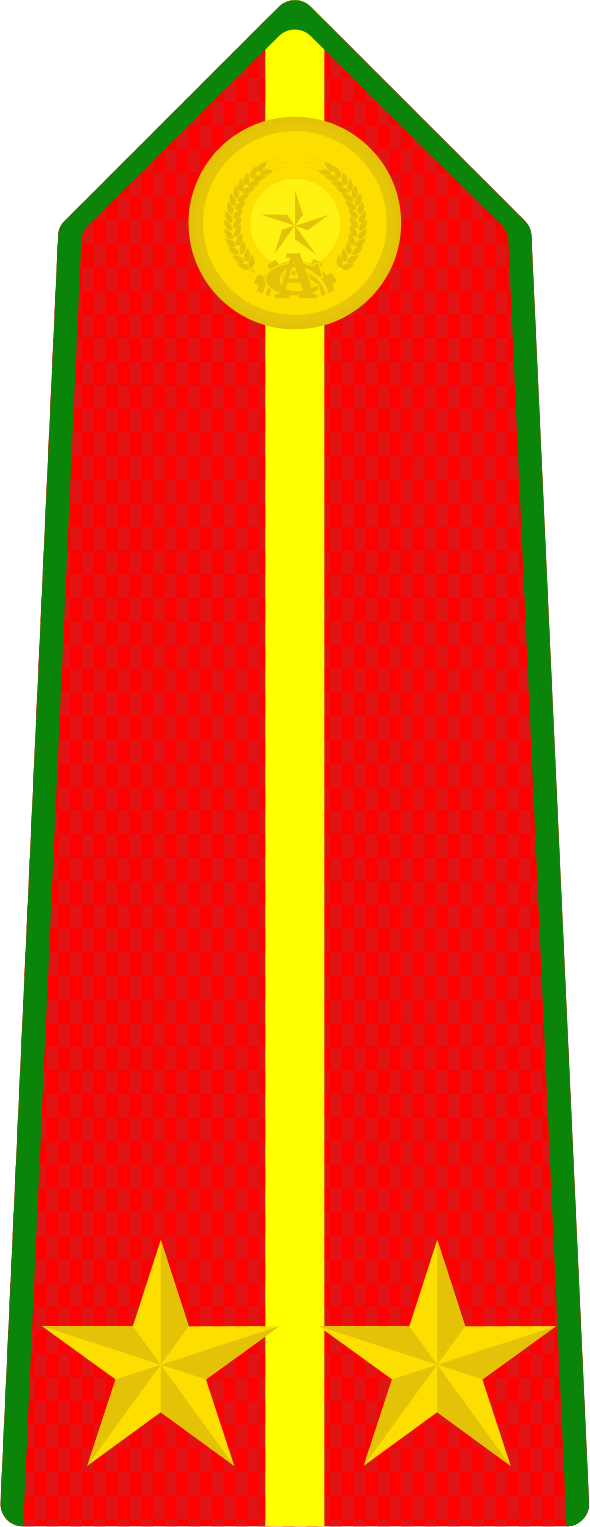 Cấp hiệu Trung úy Công an